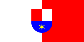 Gemaakt door Ninane naar aanleiding van het voorbeeld op 1.